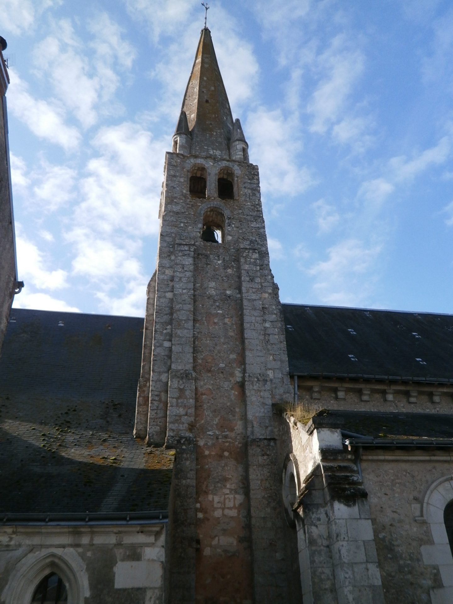 L'église